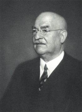 Porträt des Chemikers Carl Duisberg (* 29. September 1861 in Wuppertal-Barmen; † 19. März 1935 in Leverkusen)